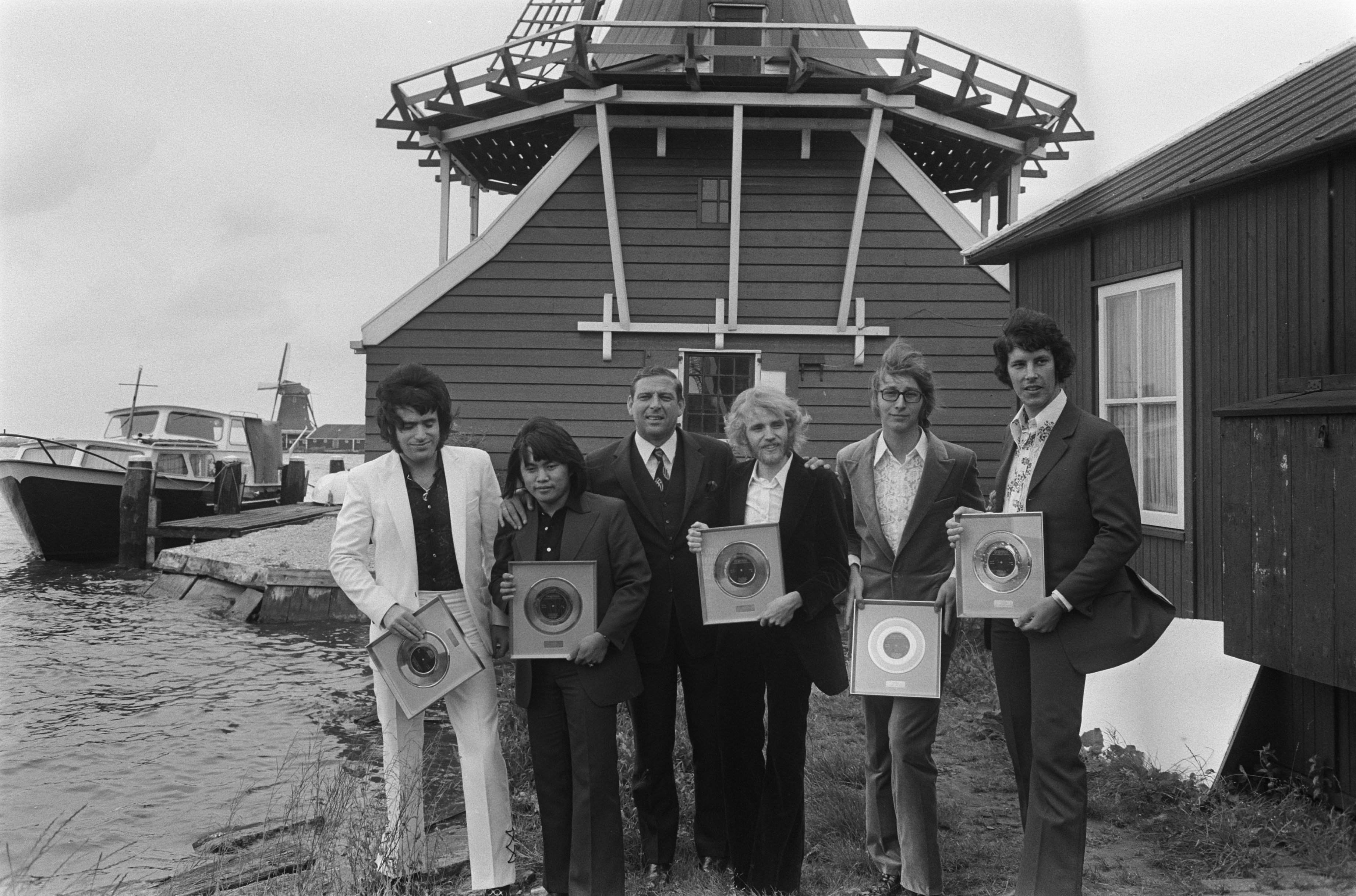 De Zaanse popgroep The George Baker Selection krijgt gouden plaat uitgereikt voor Little Green Bag (1 miljoen exemplaren) op de Zaanse Schans. Tegen het decor van de mosterdmolen De Huisman toont de groep zijn net verworven trofee. Van links naar rechts: George Baker, George Thé, onbekende persoon (manager?), Jan Visser, Jan Hop, Jacques Greuter.